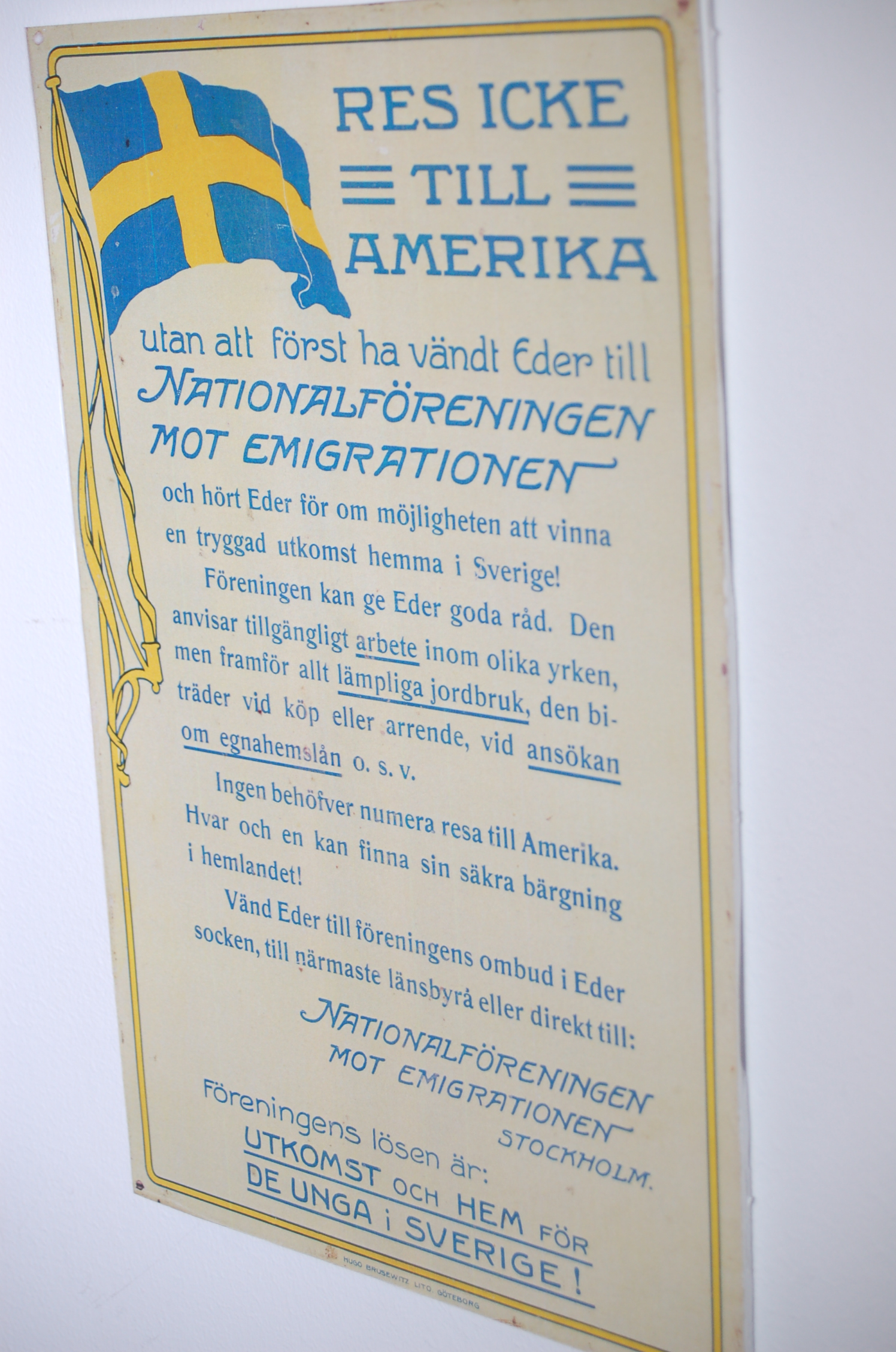 Plakat fotograferat på Sverige Amerika Centret, Karlstad 2011-12-08